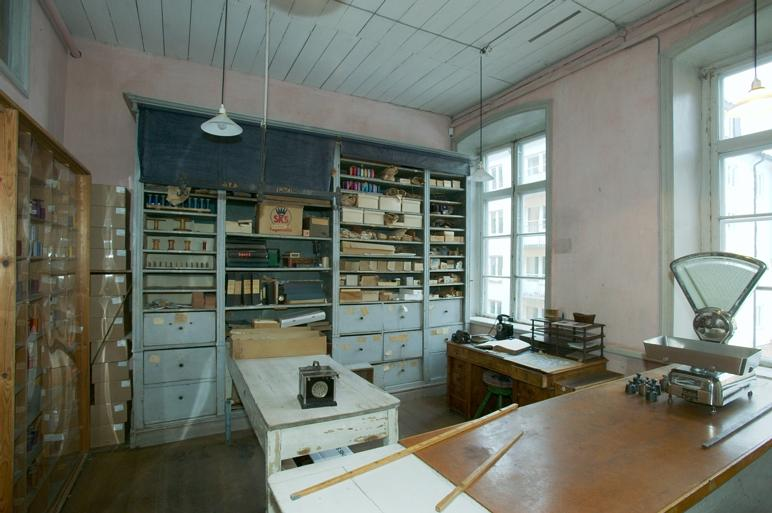 Verkmästarkontoret. Motiv: Almgrens sidenväveri Kategori: Väveri, Museum Verkmästarkontoret.